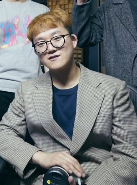 2016년의 나잠 수